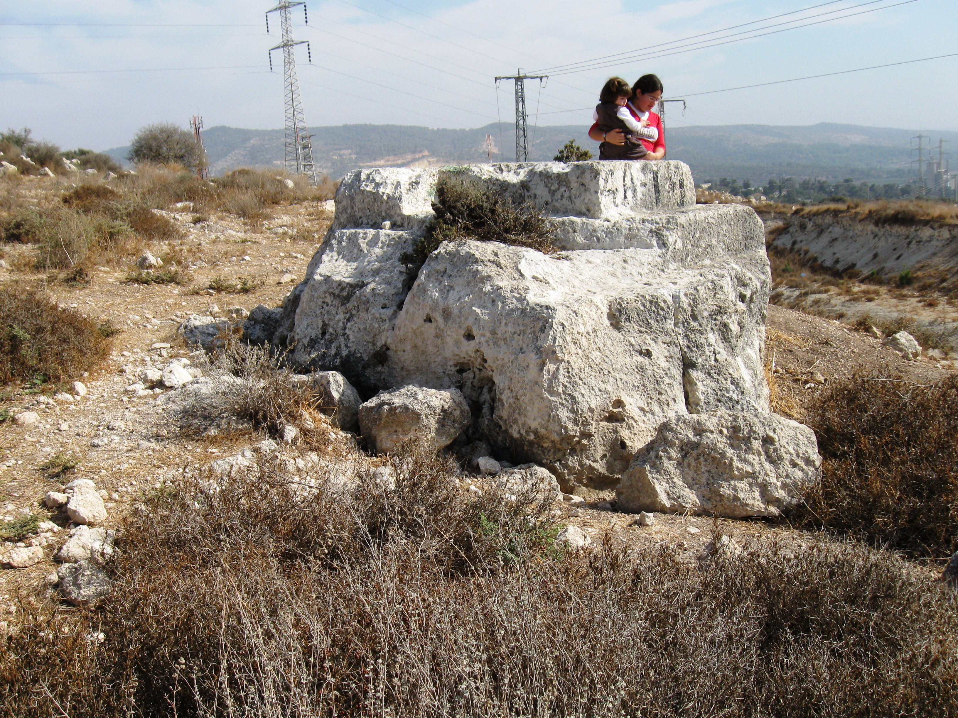 מזבח מנוח